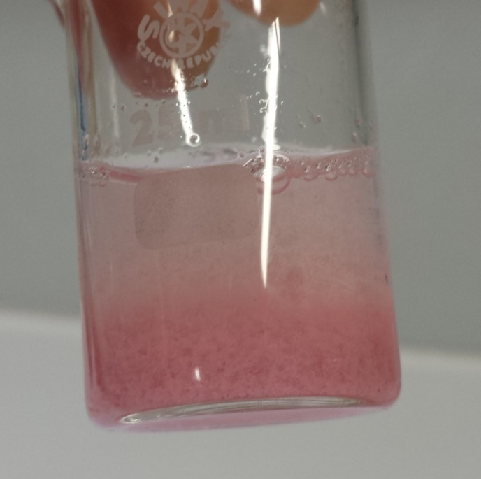 Mit Reinecke-Salz - ammonium tetrathiocyanato- diamminechromat(III) - gefälltes Hg2+ bildet einen flockigen rosafarbenen Niederschlag.